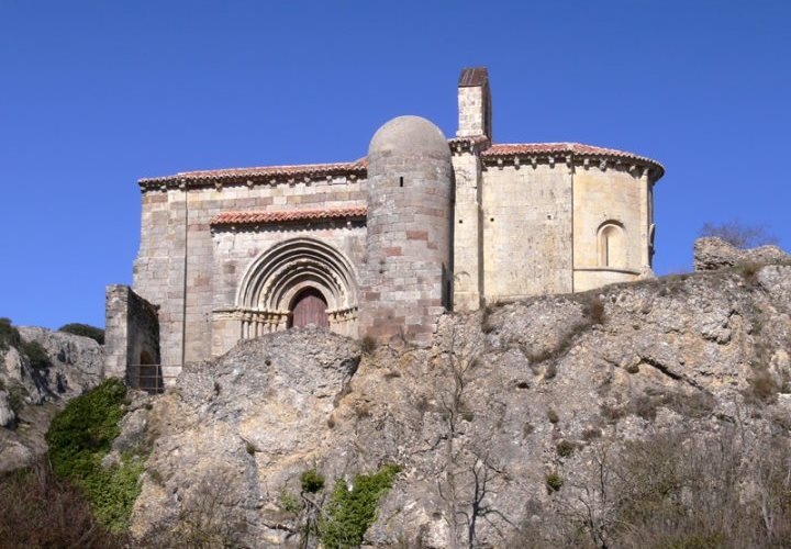 Monumento Histórico Artístico